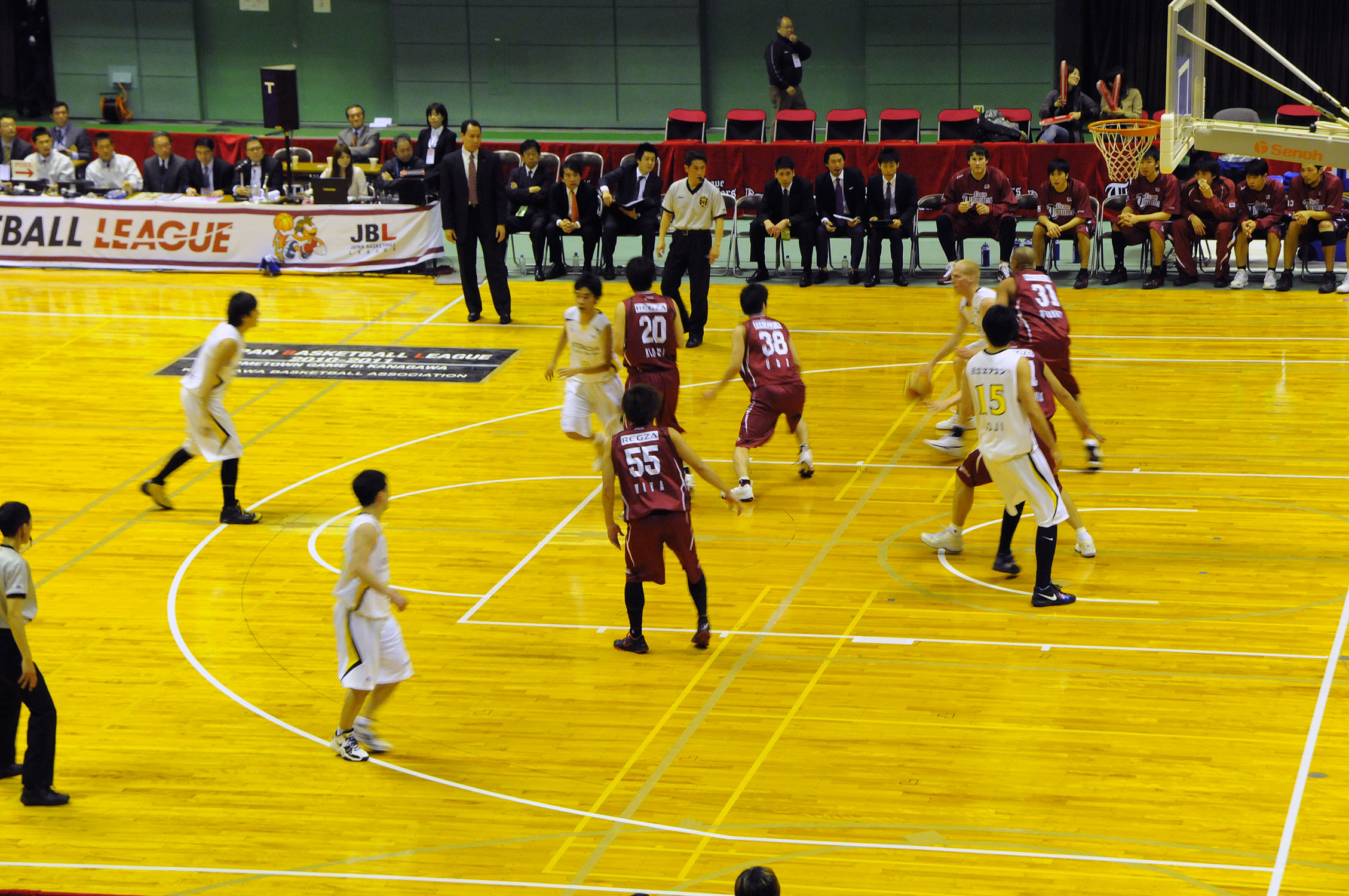 JBL 2010-2011シーズン、東芝ブレイブサンダース対日立サンロッカーズ。横須賀アリーナで。